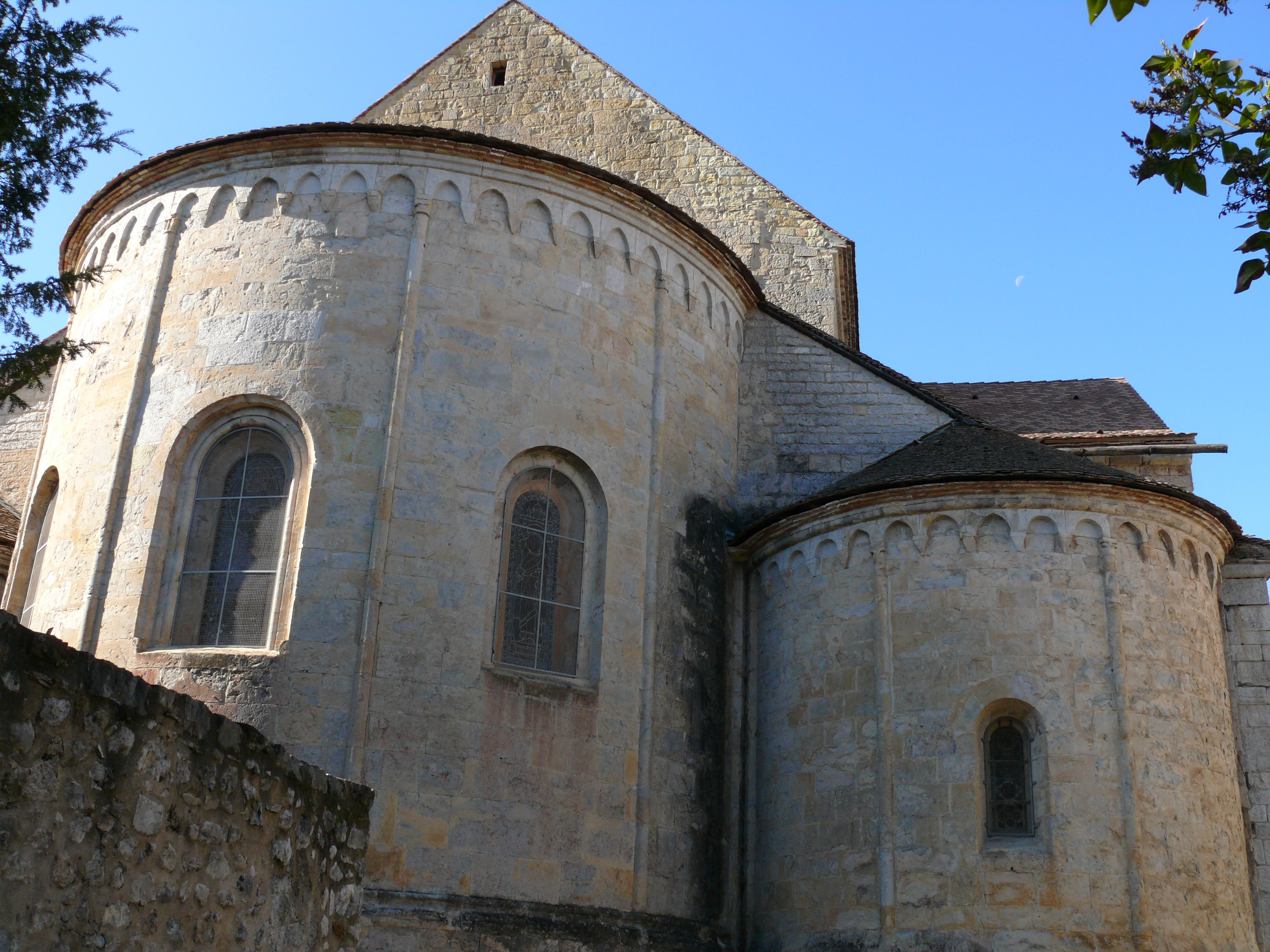 Senez - Cathédrale Notre-Dame-de-l'Assomption - Chevet